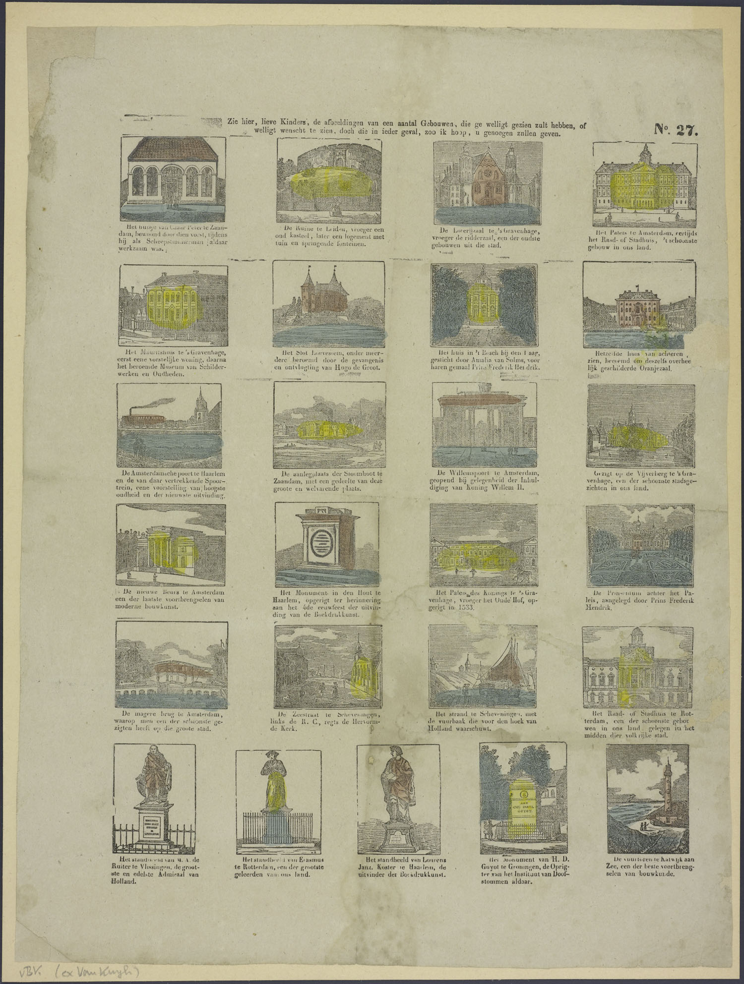 Centsprent met 6 x 4 houtsneden van gebouwen. In Zaandam: Tsaar Peter-huisje en aanlegplaats van de stoomboot; in Leiden: ruine; in Den Haag: Ridderzaal, Vijverberg, Mauritshuis, Paleis en Prinsentuin, Huis ten Bosch; in Amsterdam: Koninklijk Paleis, Beurs, Magere brug, Willemspoort; in Haarlem: Amsterdamse poort en monument voor de boekdrukkunst; in Scheveningen: Zeestraat en strand; in Rotterdam: stadhuis; Groningen: monument van H.D. Guyot; Katwijk: vuurtoren. Verder slot Loevestein, standbeelden van De Ruyter, Erasmus en Koster. Met onderschriften van enkele regels.